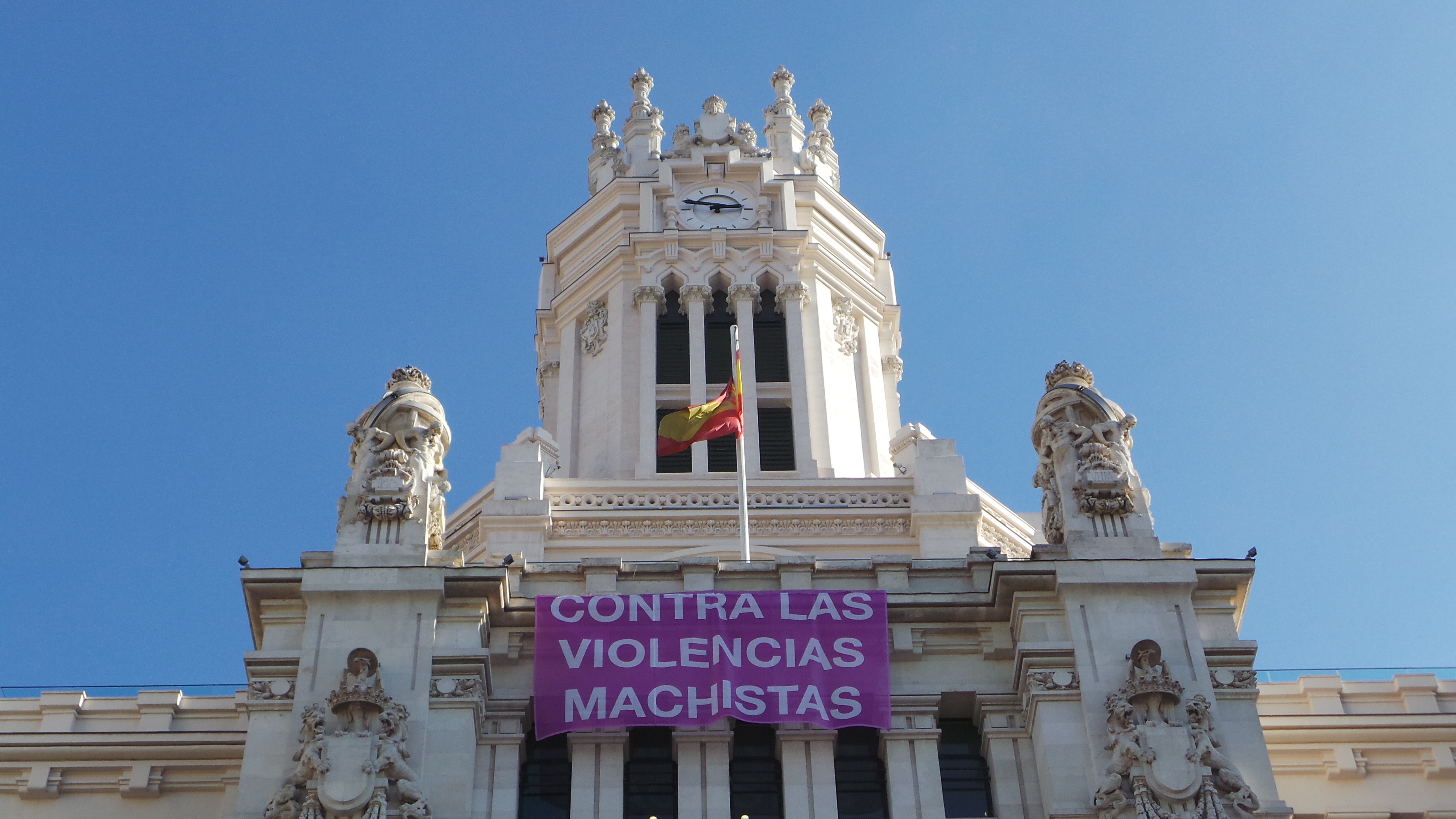 Banderola en el Ayuntamiento de Madrid en apoyo del 7N Marcha Estatal contra las violencias machistas